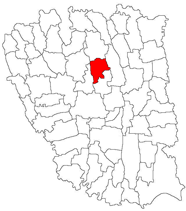 Categorie:Hărţi ale judeţului Galaţi